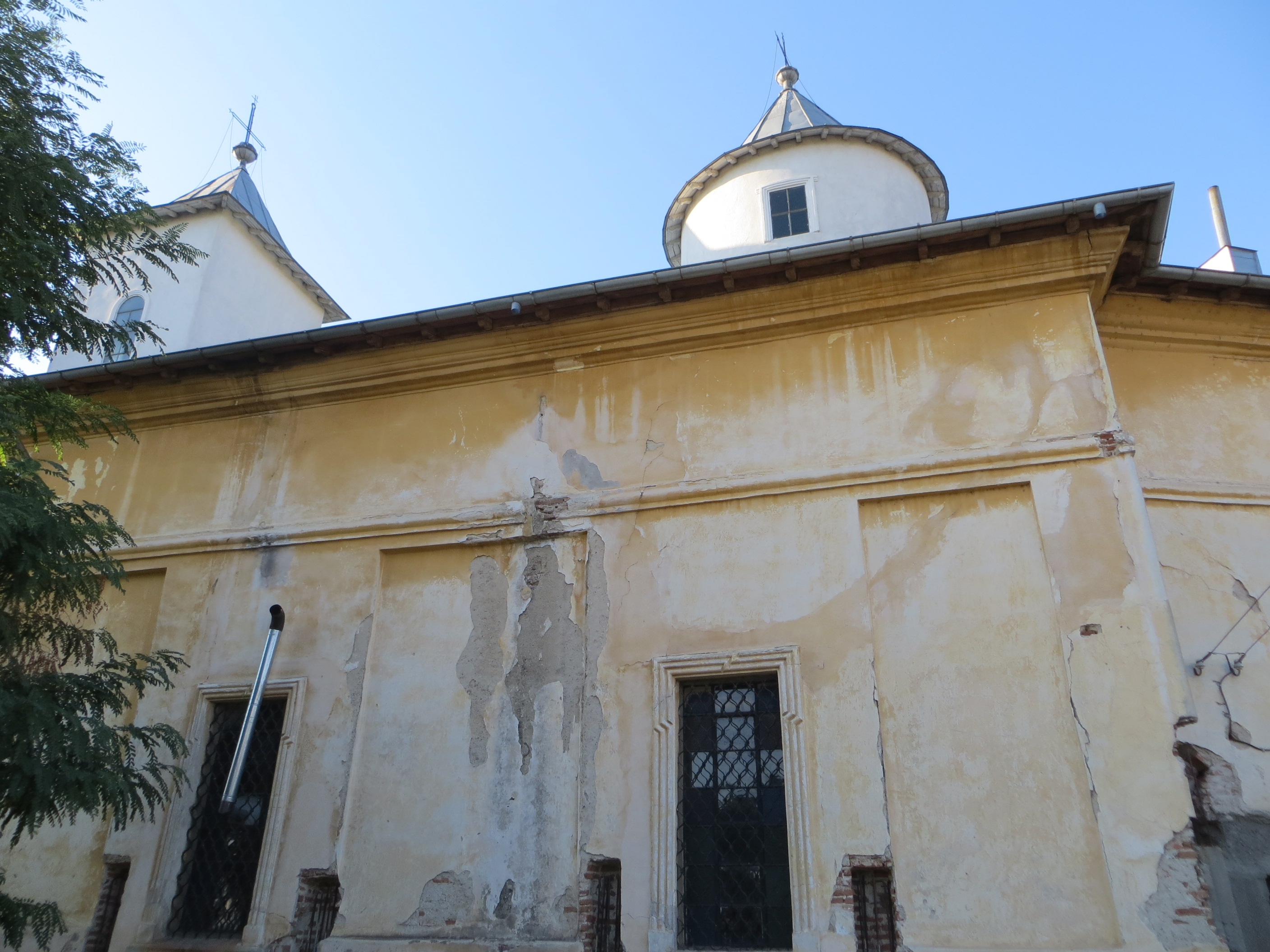 Biserica "Sf. Împărați Constantin și Elena"